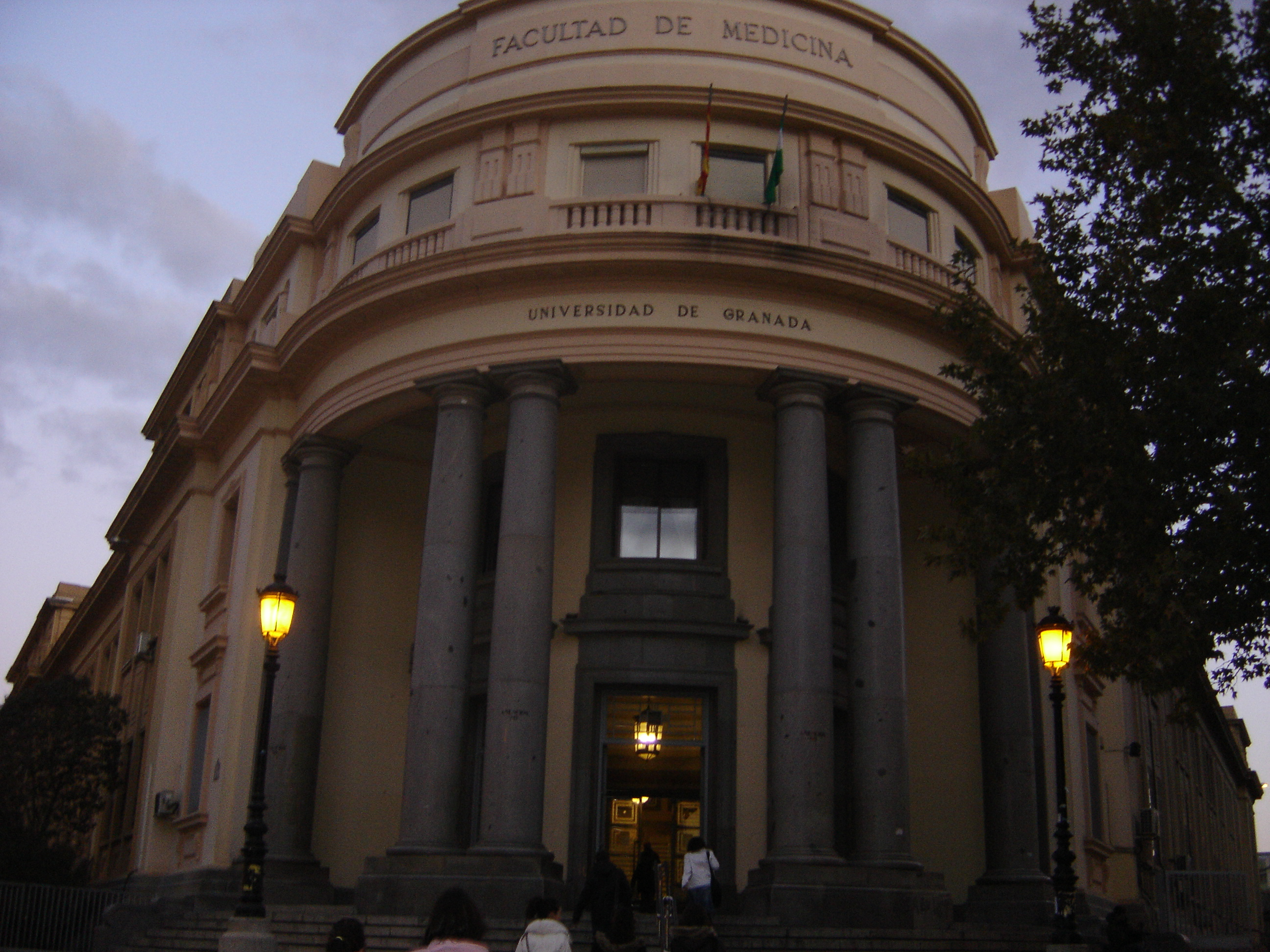 Entrada principal facultad de medicina de granada